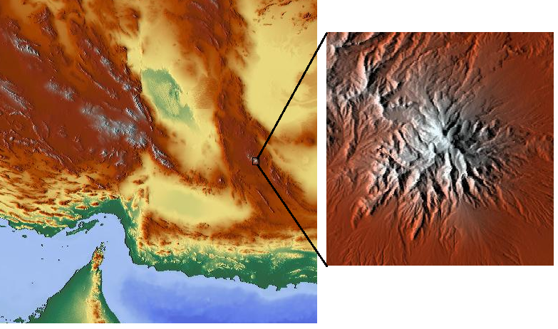 Taftan in Iran